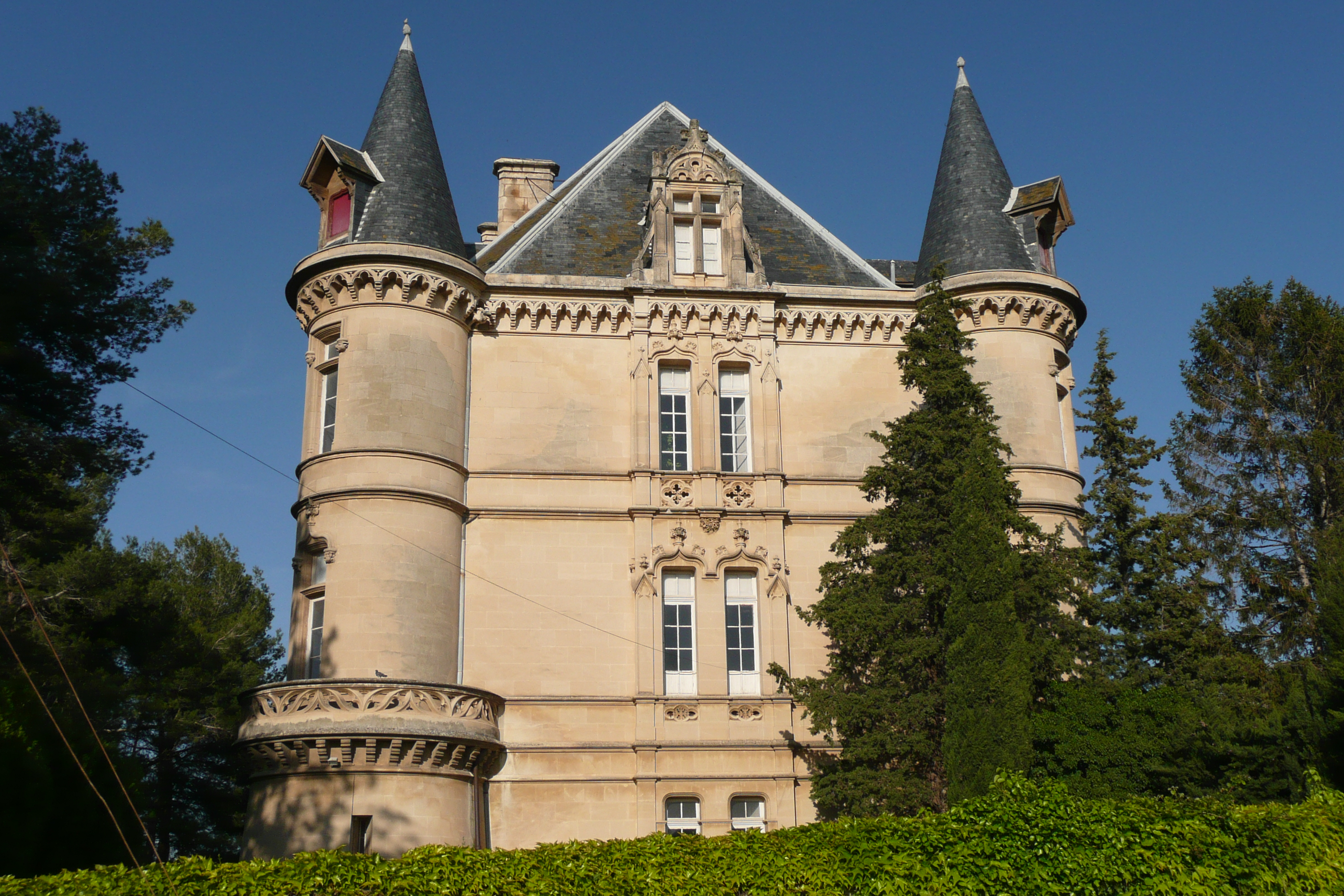 Château à Charleval (Bouches-du-Rhône).